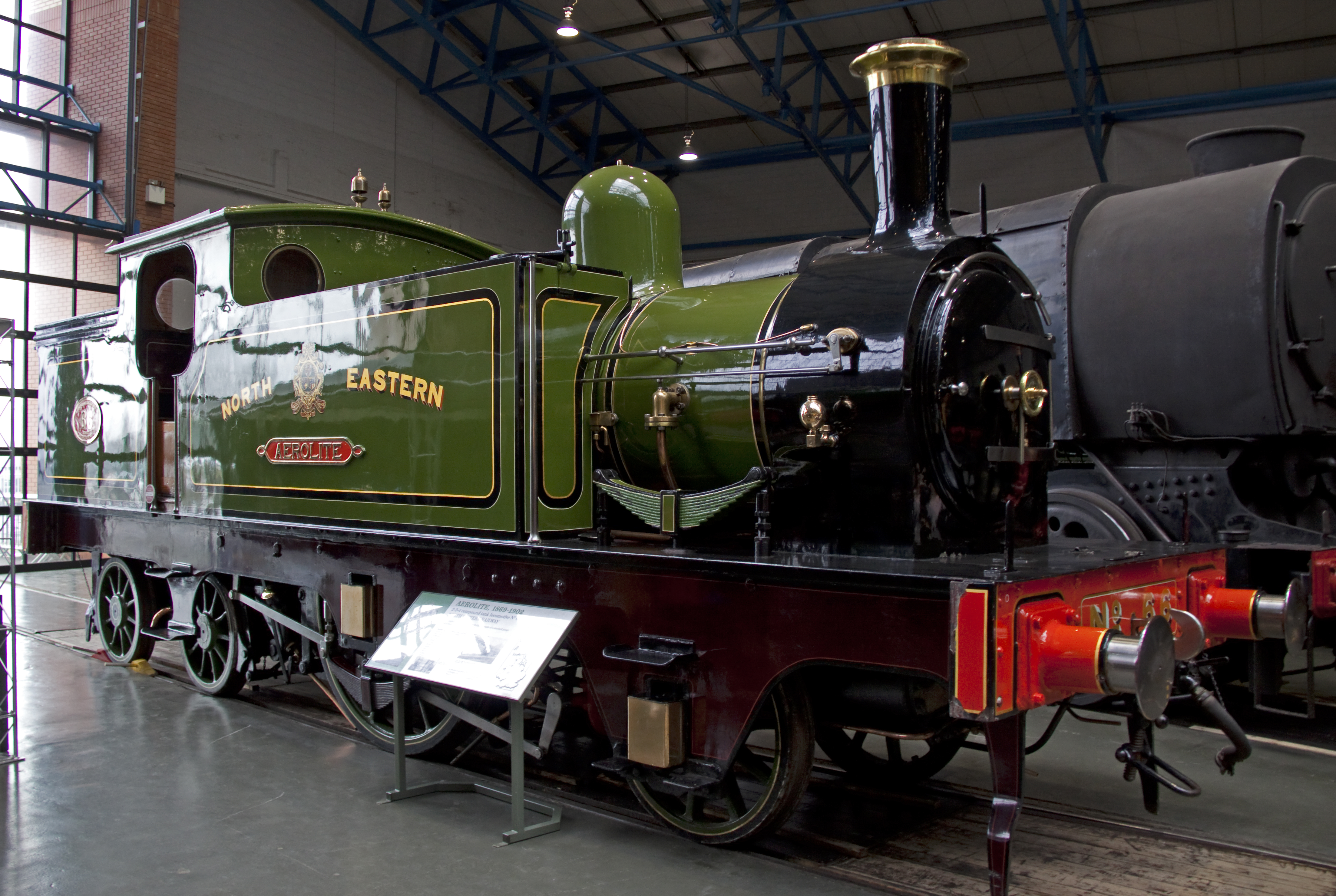 Aerolite